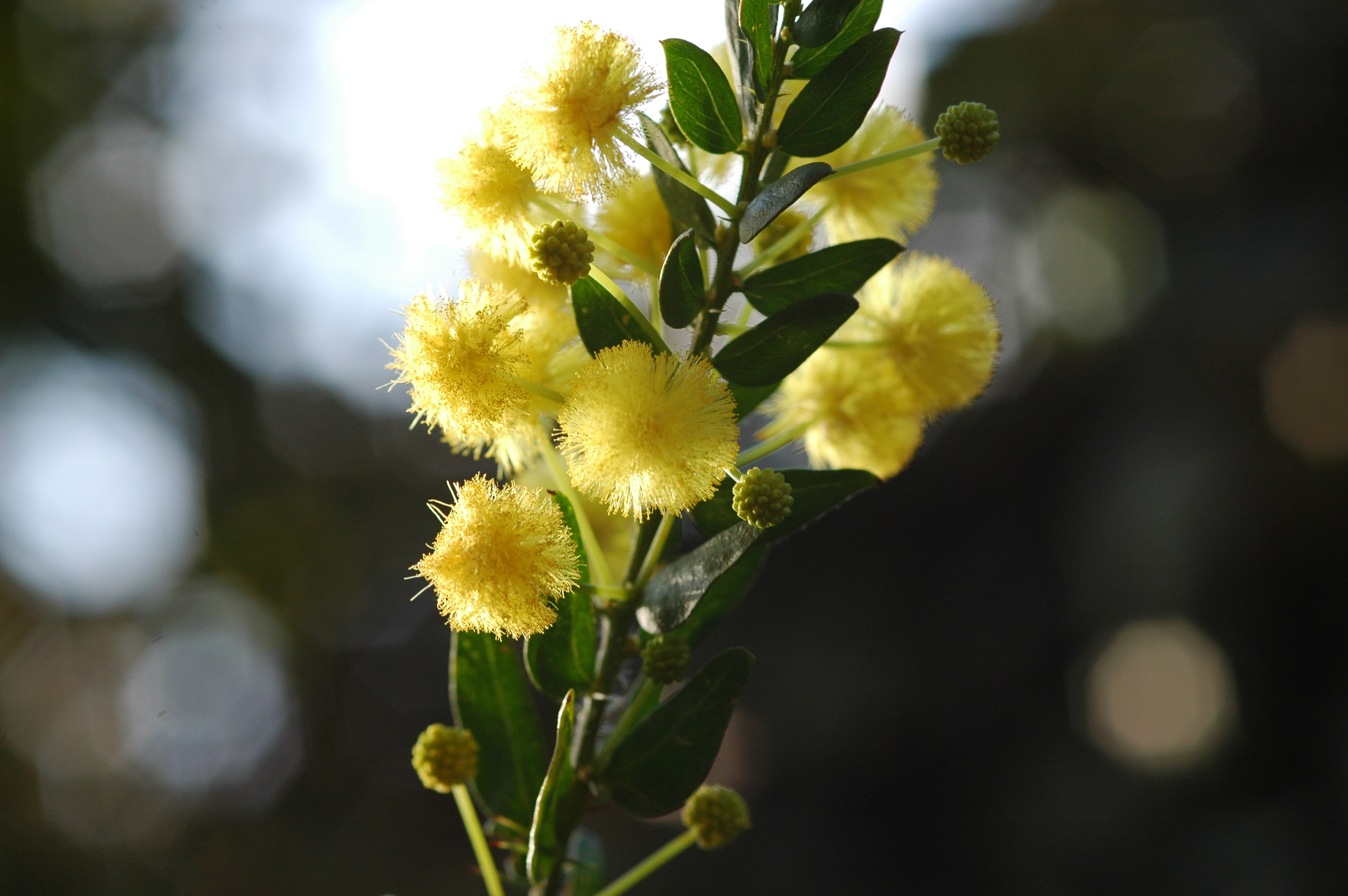 Kängurudorn